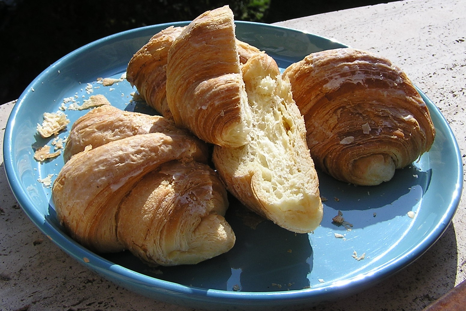 Da quando Ancona, nella seconda guerra mondiale, fu liberata dalle truppe del Secondo Corpo Polacco del generale Anders, le pasticcerie della città hanno cominciato a chiamare "polacche" le tipiche pasterelle preparate per la colazione al bar. Ripsetto ai comuni cornetti sono più grandi, ricoperte da una leggera glassa di chiara d'uovo e con uno strato di pasta di mandorle; anche l'impasto è diverso, più consistente e un po' sfogliato.